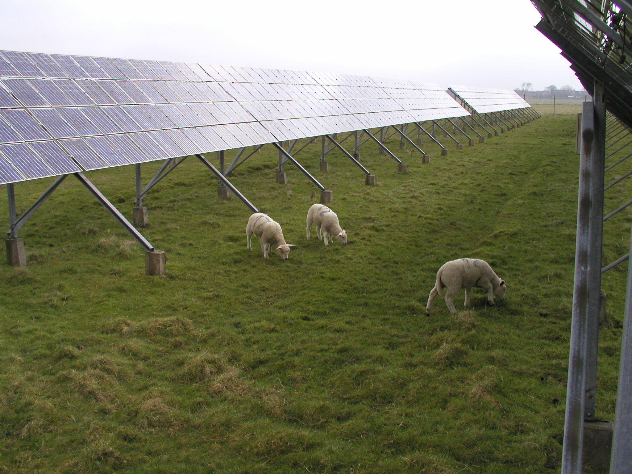 Pellworm Solarkraftanlage